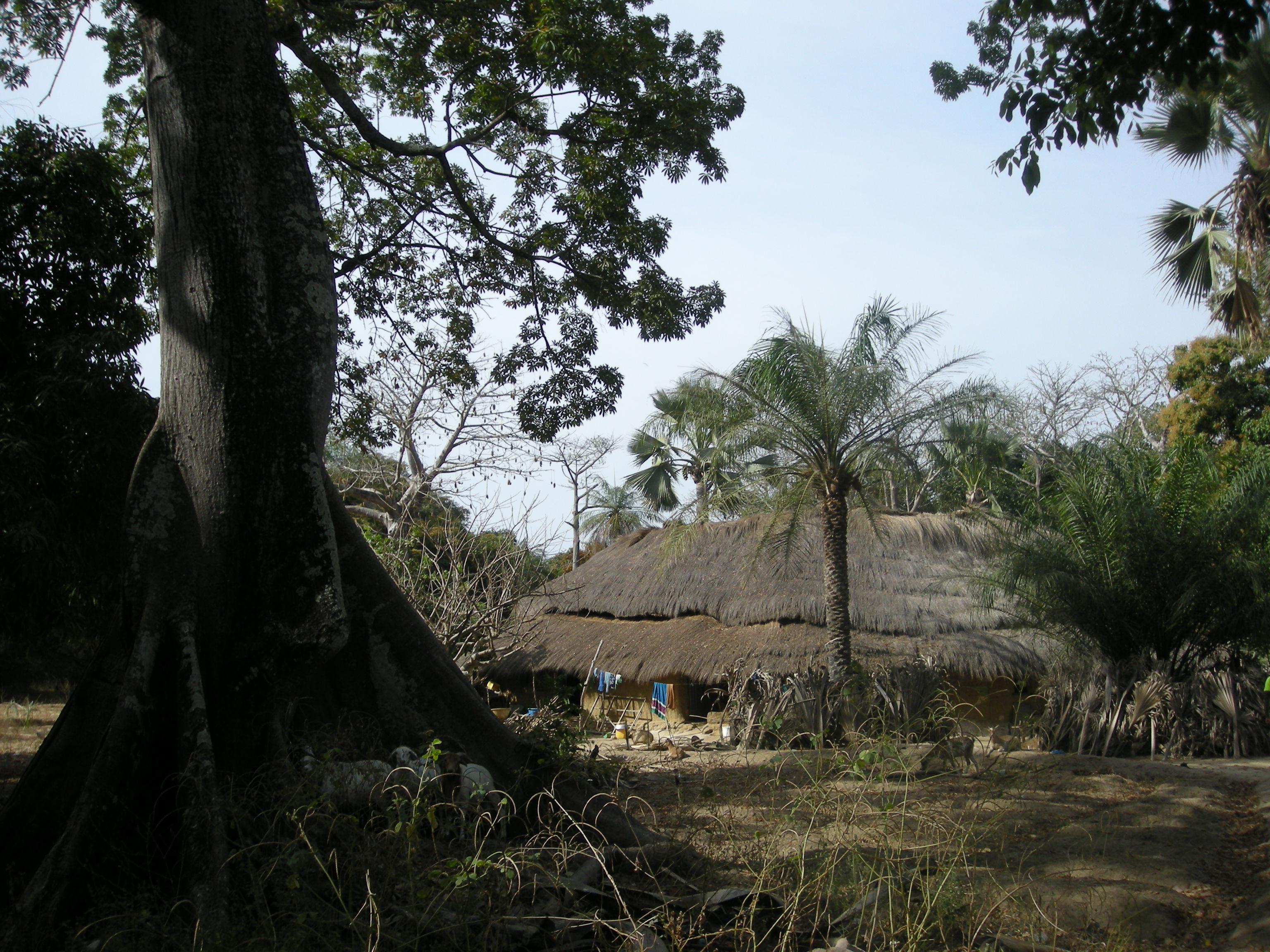 Fromager (à gauche) et case familiale à impluvium à Enampor (Casamance, Sénégal)